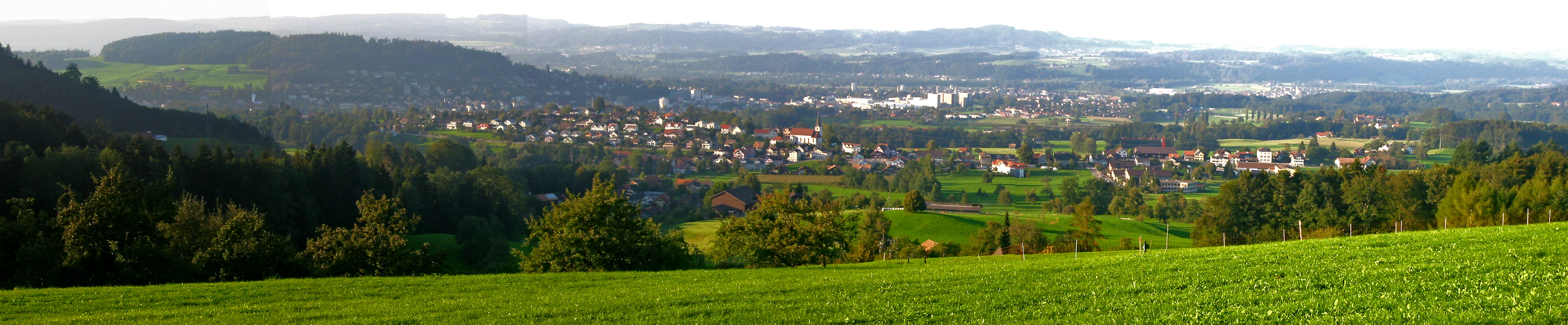 Panorama Uzwil-Oberuzwil. Im Vordergrund von links nach rechts: Bichwil, Riggenschwil; hinten: links nach rechts: Oberuzwil, Uzwil, Industrie Uzwil, Niederuzwil. Selbstfotografiert vom Eppenberg aus.